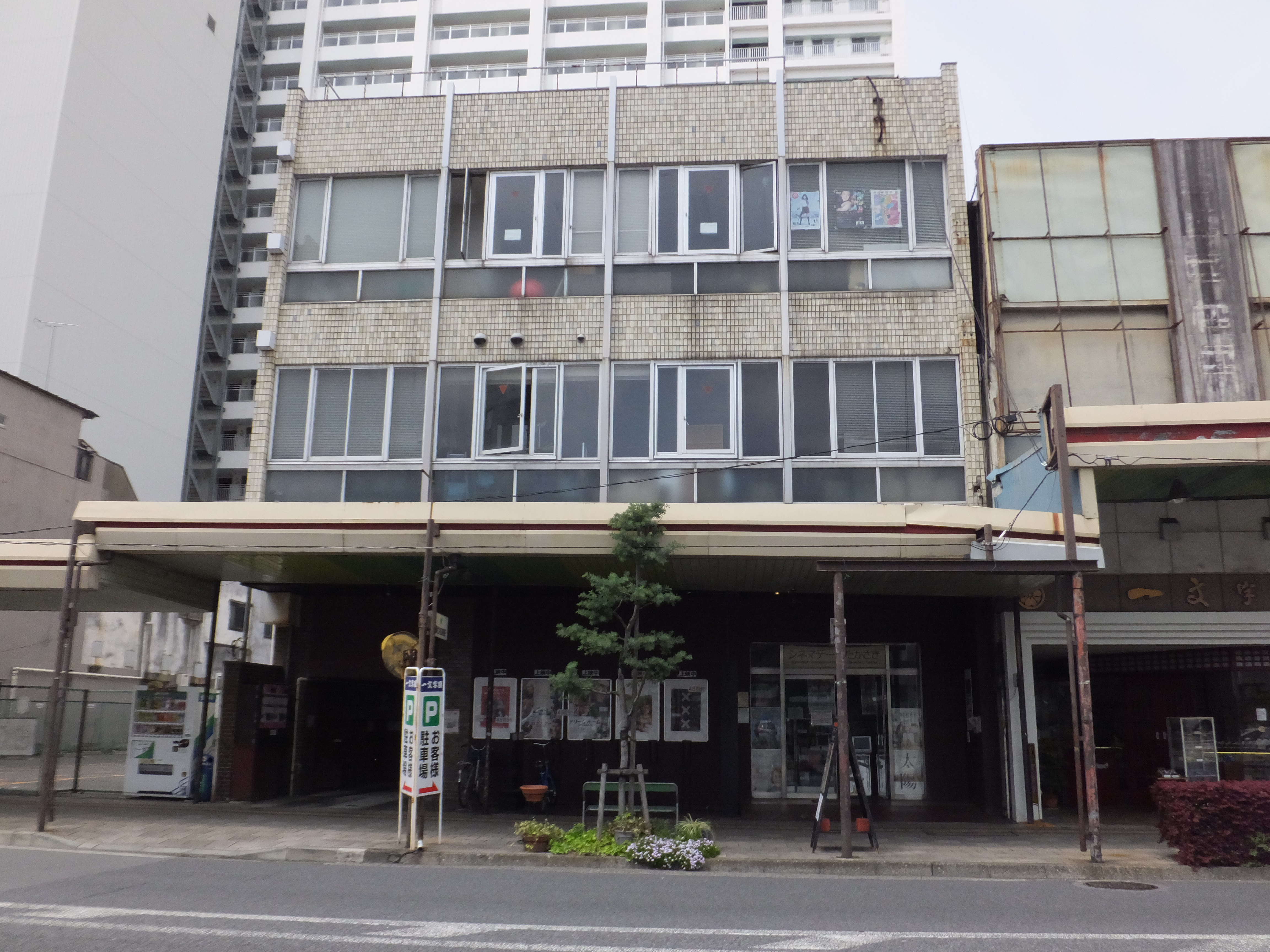 高崎市にあるシネマテーク高崎の外観